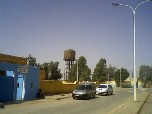 Ancien ville d'abadla